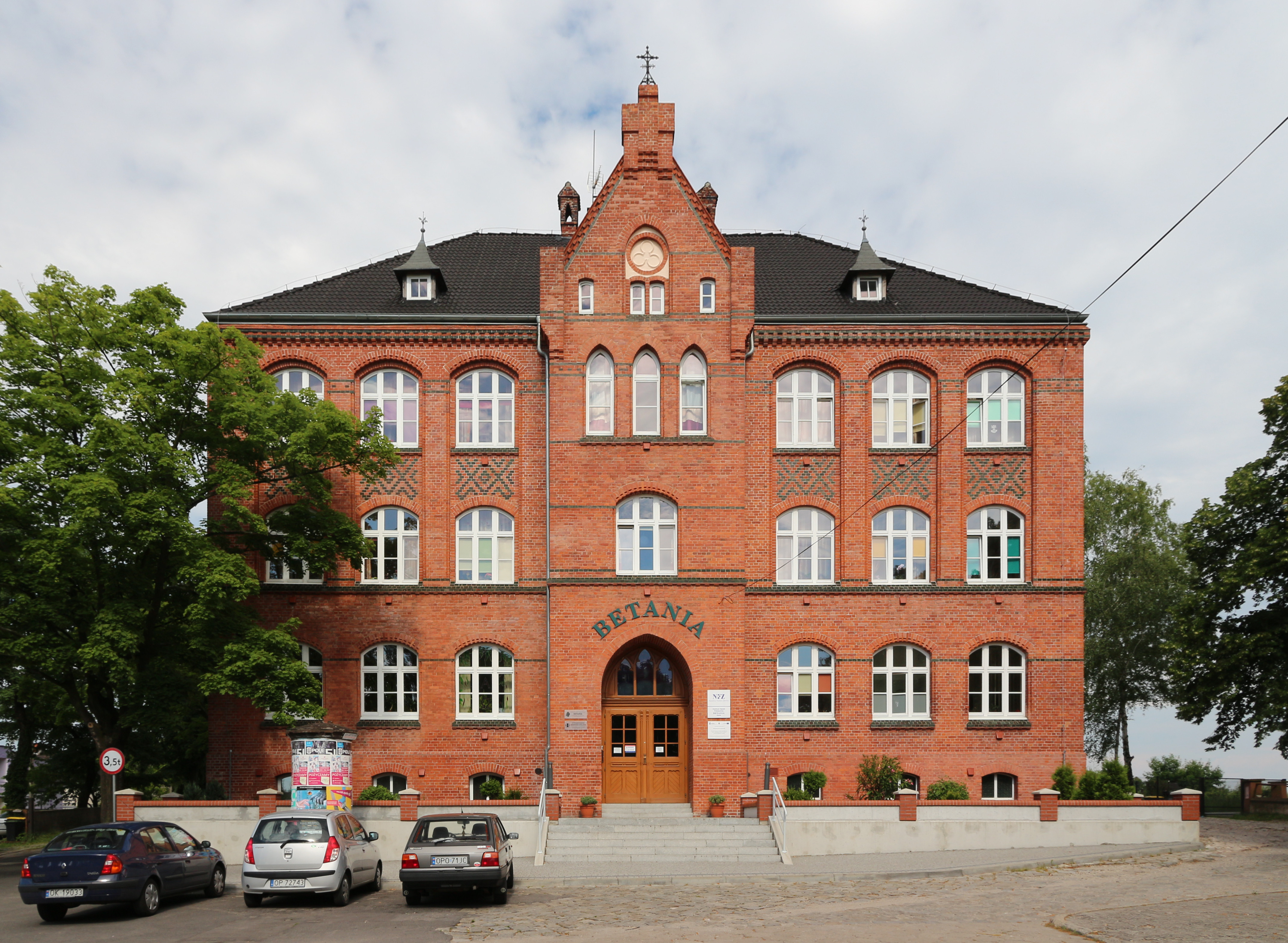 Opole - zabytkowa szkoła, obecnie hospicjum Betania w Nowej Wsi Królewskiej.